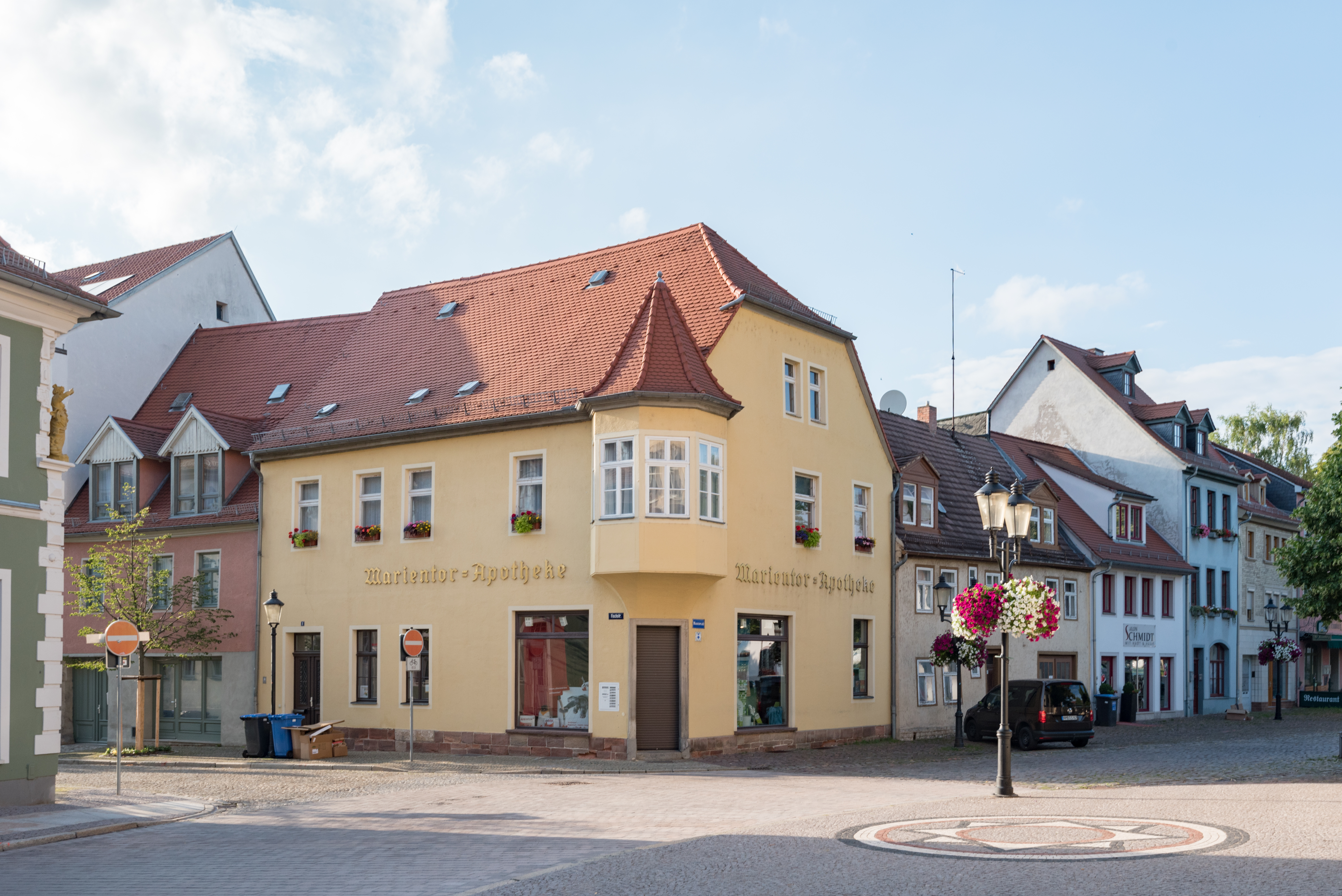 Naumburg (Saale), Fischstraße 1